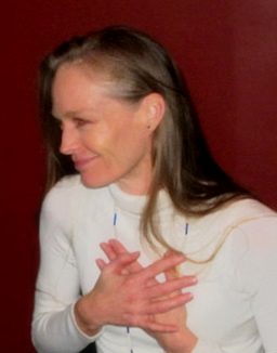 Suzy Amis 2010